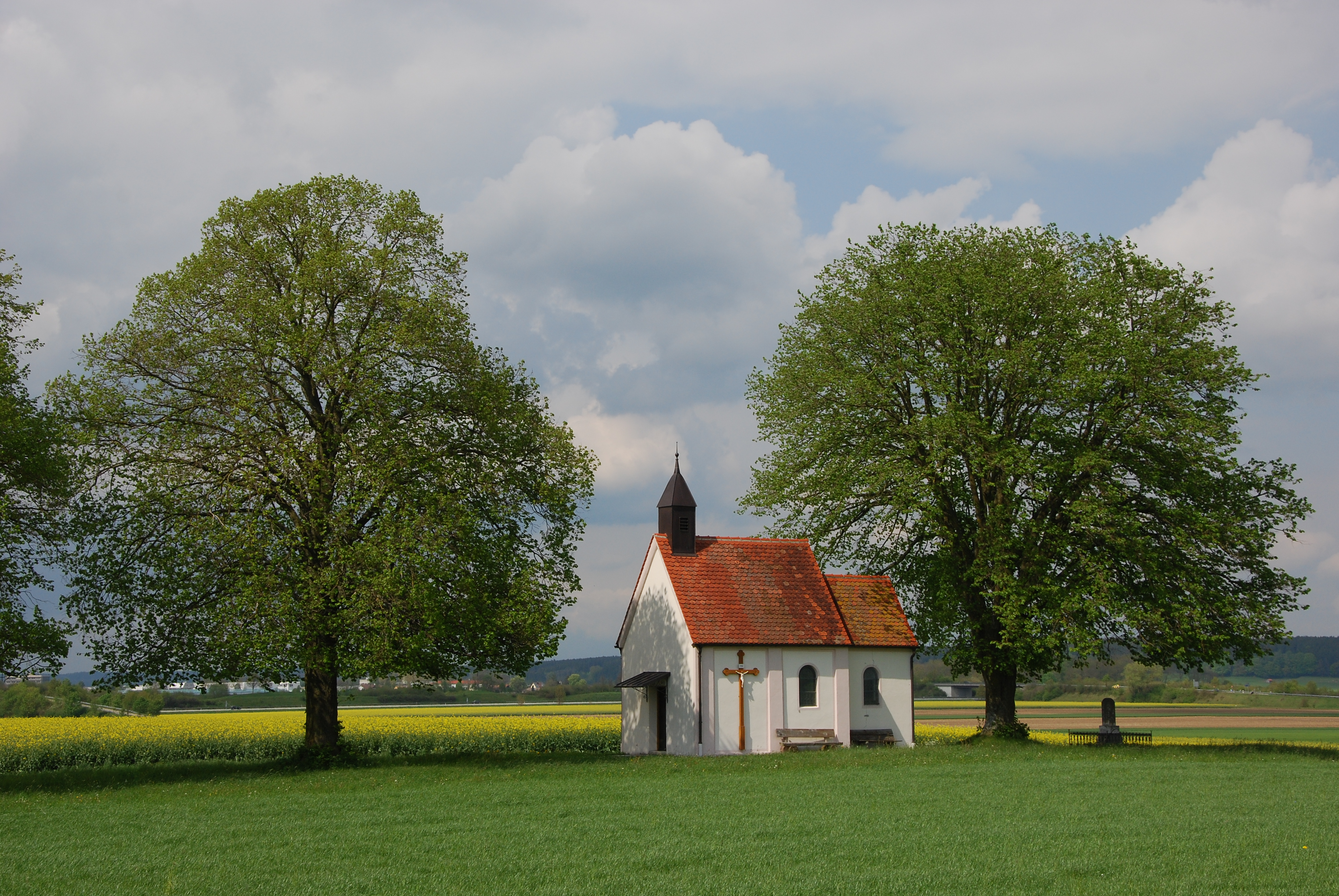 Kapelle zu den Vierzehn Nothelfern, ApfeltrachThis is a photograph of an architectural monument.